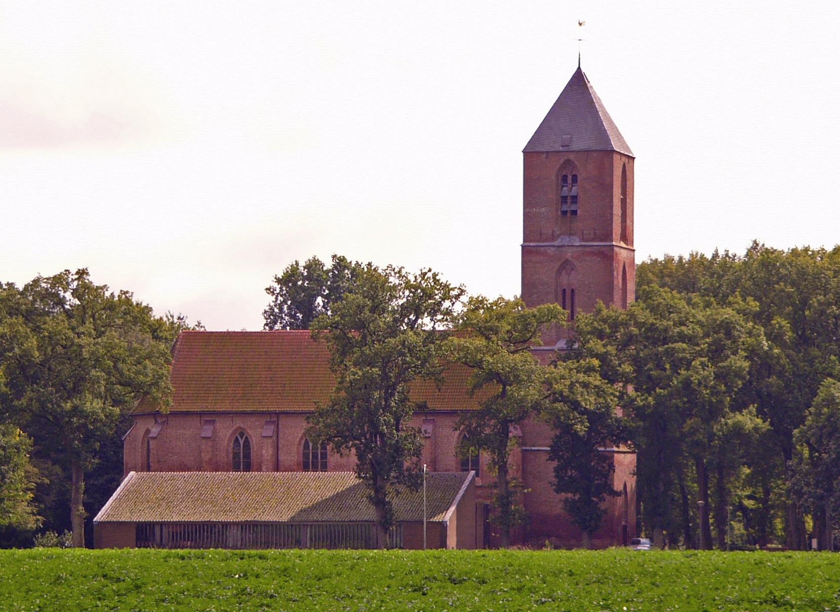 Kerk van Havelte in Havelte